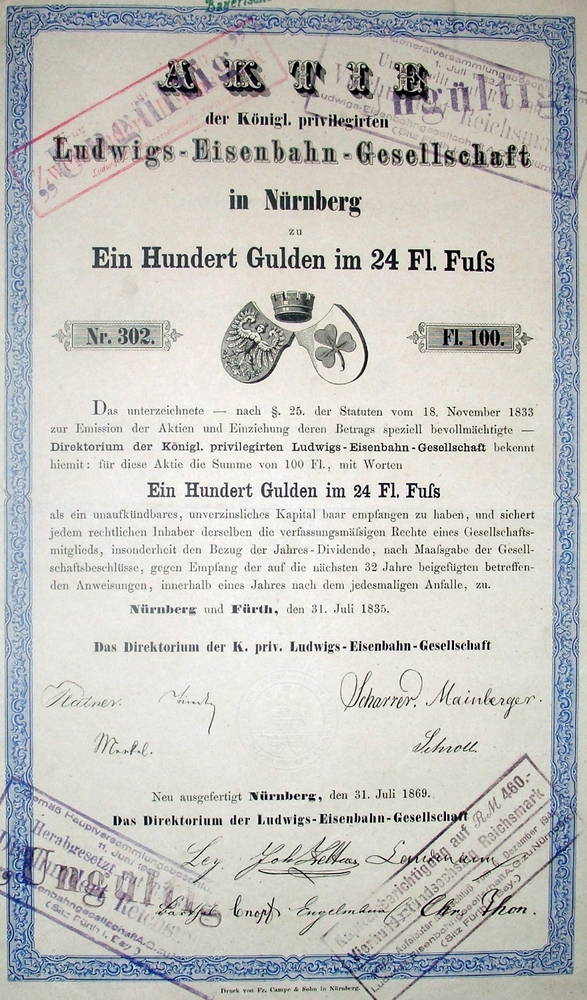 Aktie Bayerische Ludwigseisenbahn von 1835/69. Eigenes Foto von eigener Urkunde. Hans Schlieper, 31. Mai 2006.